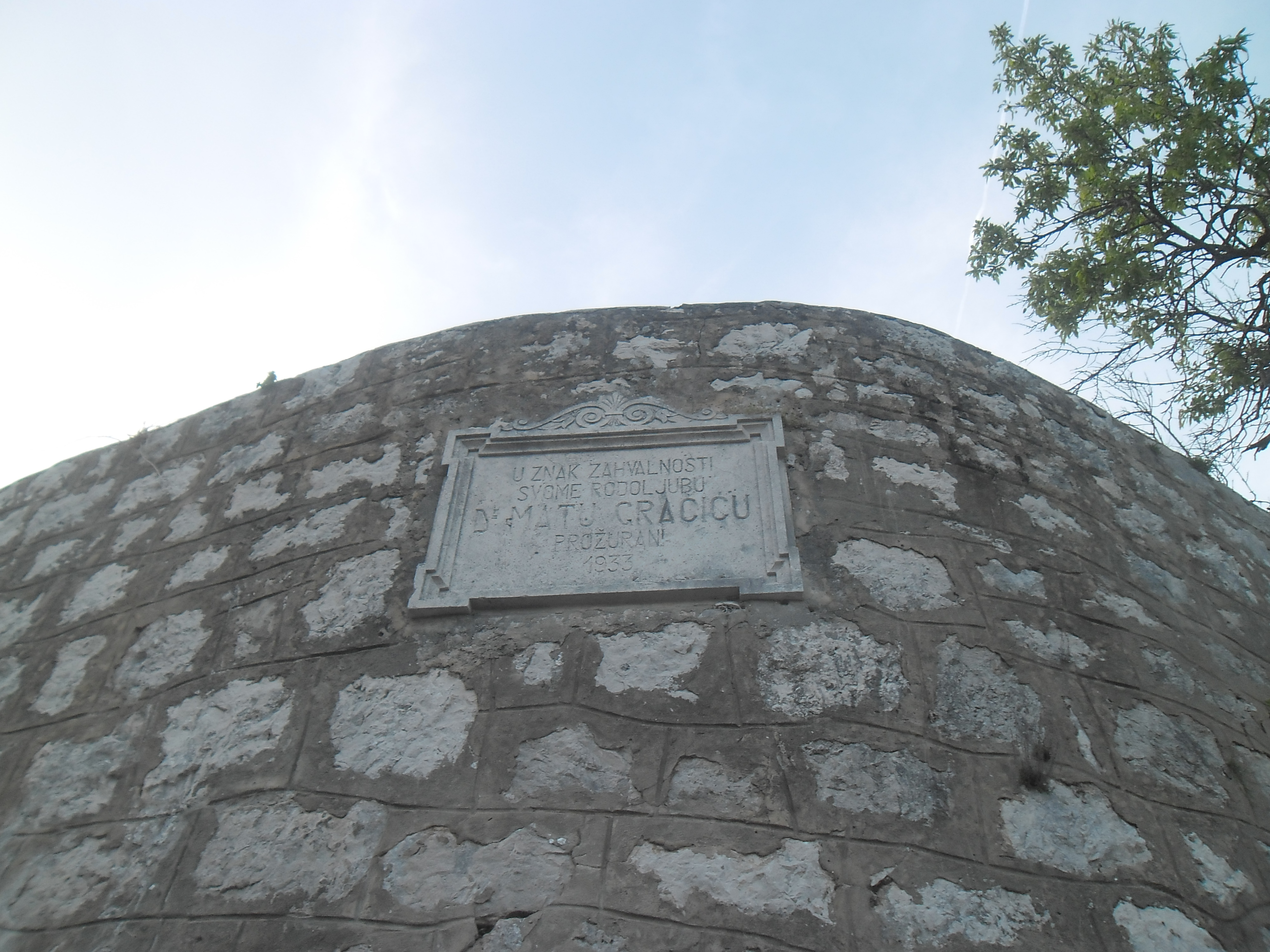 Prožura na otoku Mljetu